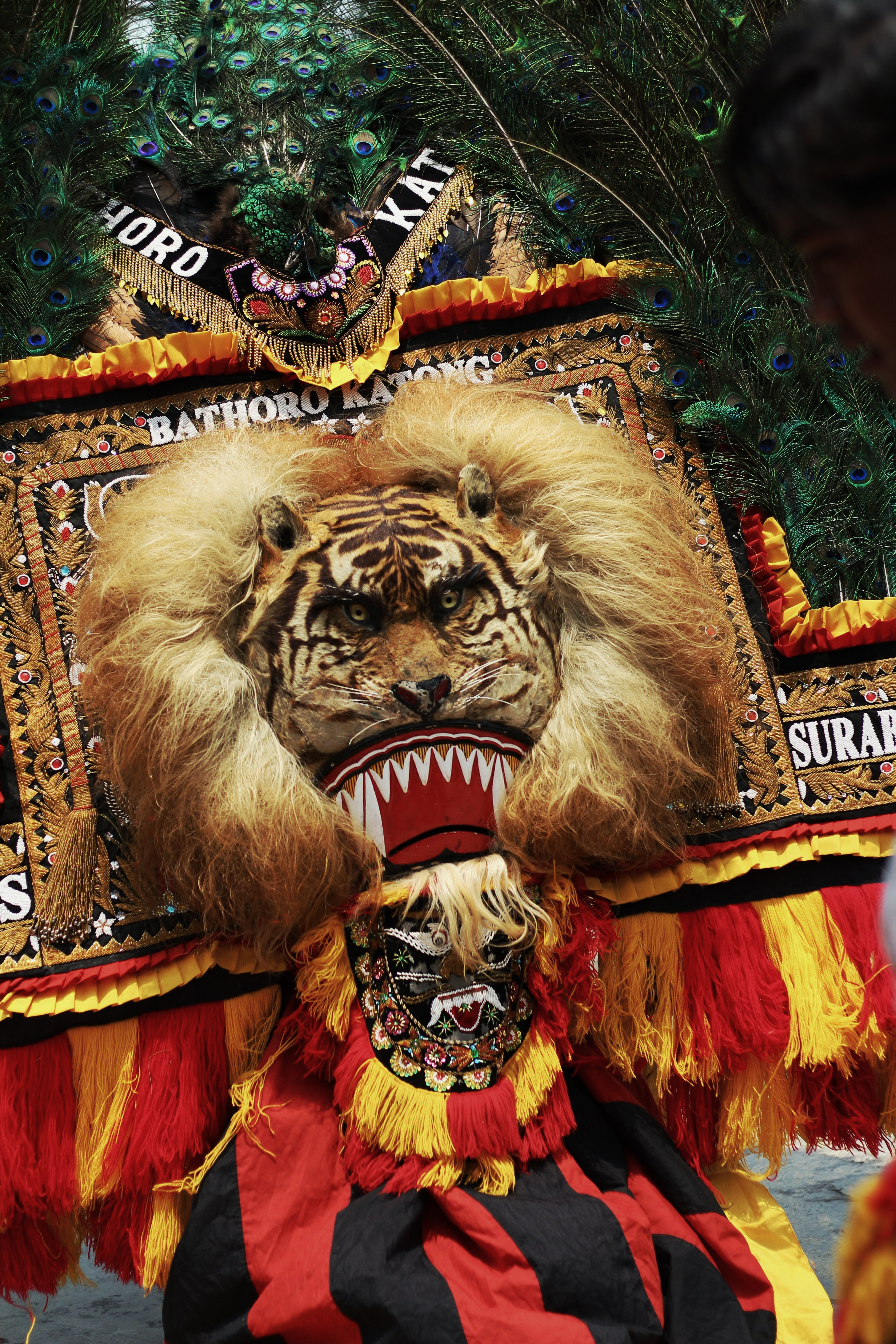 Ini adalah Reog Ponorogo. Salah satu kebudayaan yang berasal dari Kabupaten Ponorogo, Jawa Timur, Indonesia. Dalam beratraksi, ini termasuk dalam urutan ketiga dimana Sang warok sebagai penari laki-laki utama, mengenakan topeng singa besar dan berat, menari di tengah panggung sementara para penari lainnya menari di sekitarnya. Untuk mendemonstrasikan kekuatan luar biasa warok, Jatil naik ke atas topeng singa dan dibawa berkeliling.